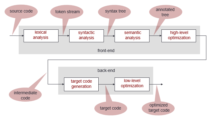 сщьзшду